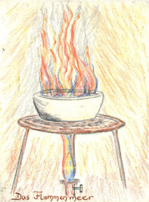 Das Flammenmeer, Lehrstück Faradays Kerze, Susanne Wildhirt